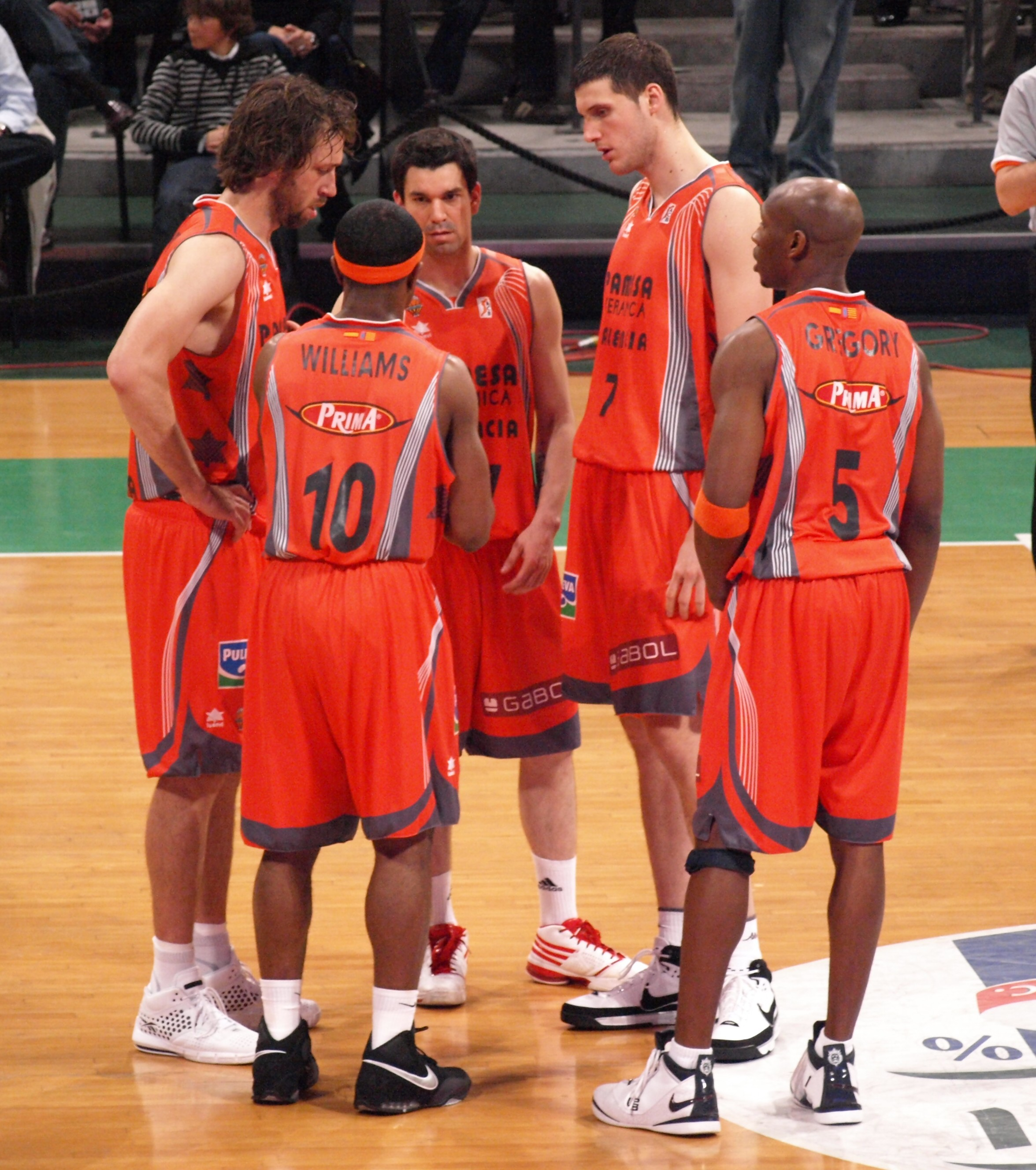 Quinteto inicial del Pamesa Valencia en el partido que les enfrentó al DKV Joventut en el Pabellón Olímpico de Badalona de la liga ACB 2008/09.